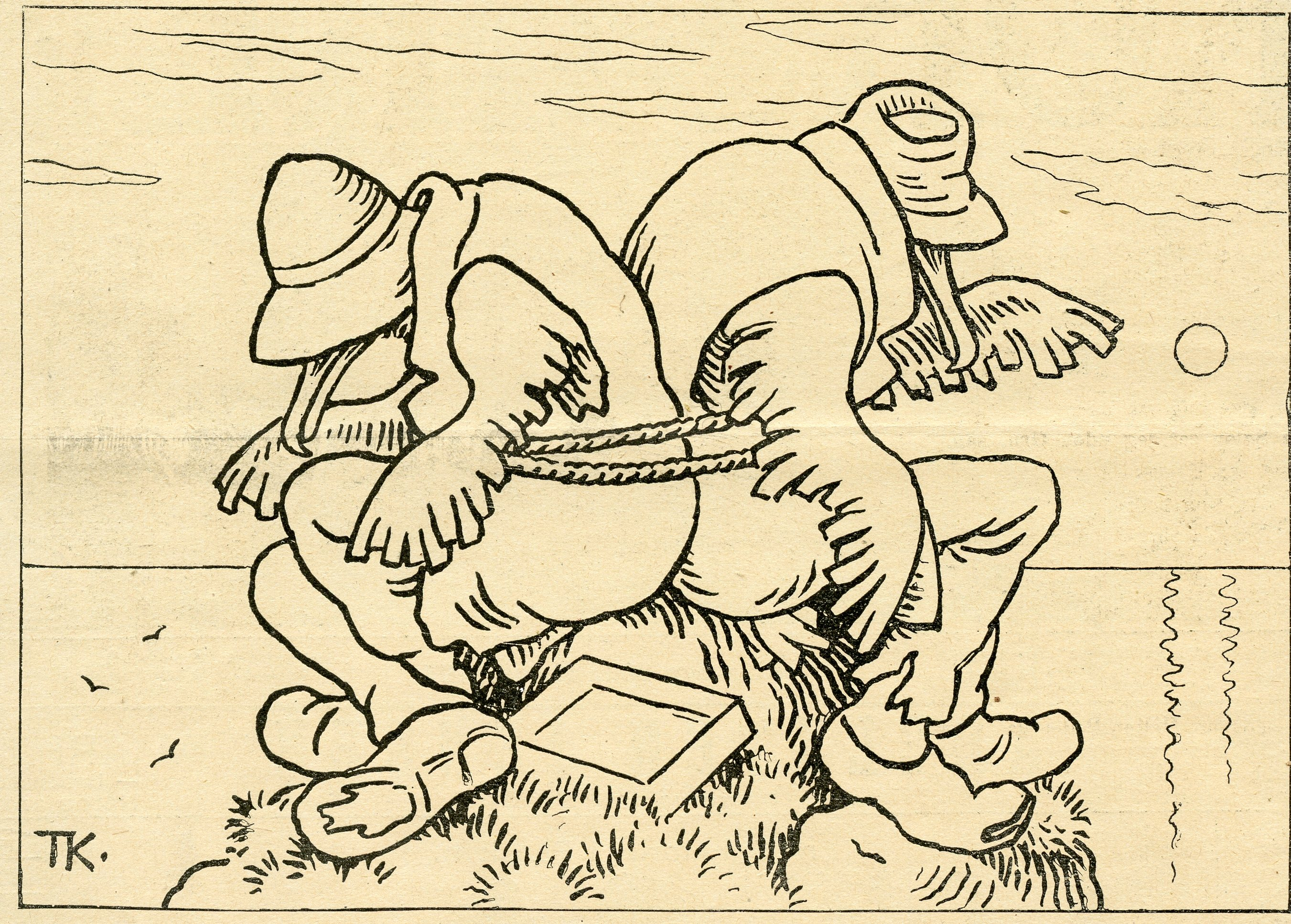 Skarvene paa Utrøst.